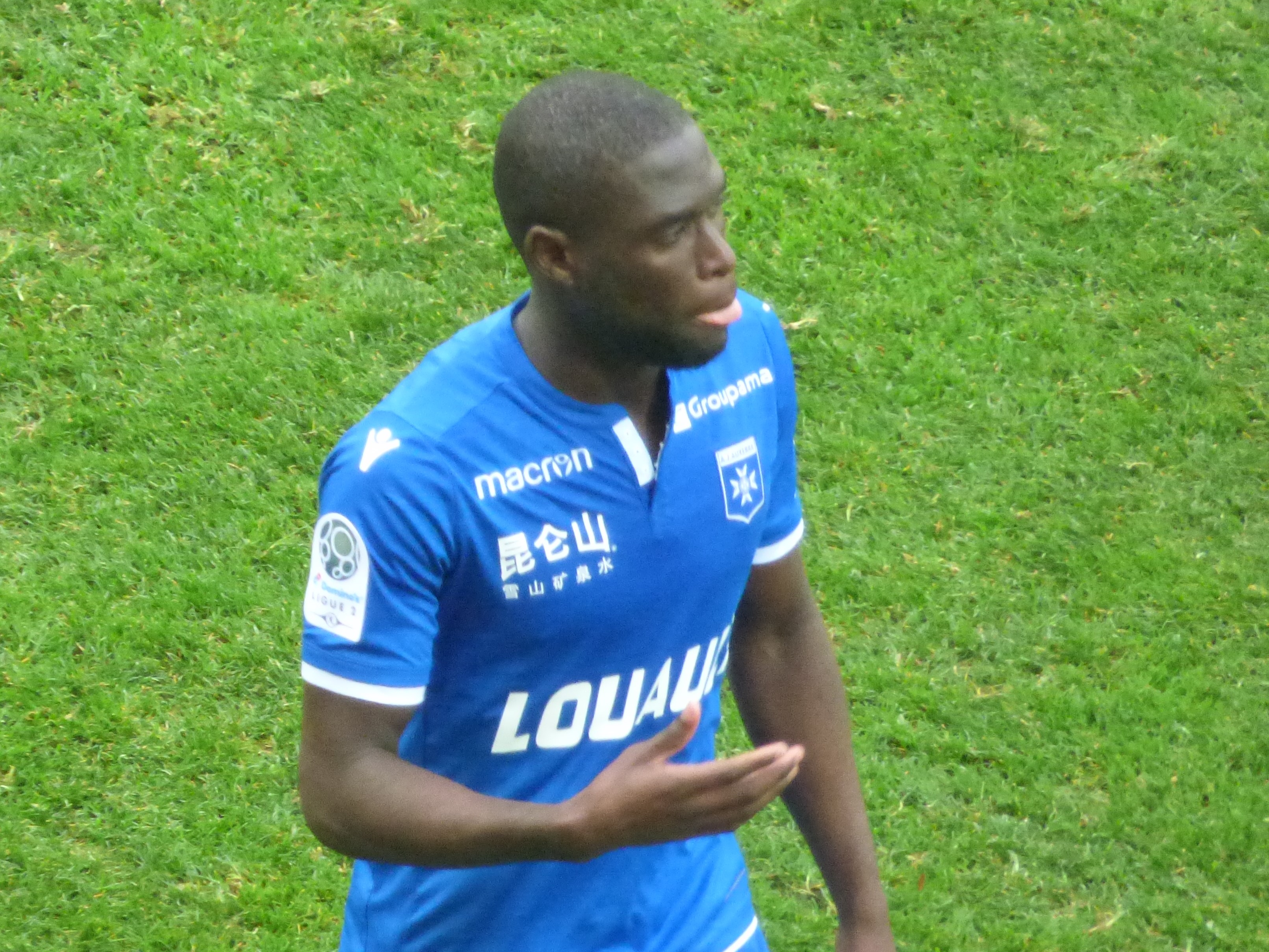 Carlen Arcus lors du match RC Lens - AJ Auxerre, comptant pour la 28ème journée du championnat de France de football de Ligue 2 2018-2019, le 9 mars 2019 au Stade Bollaert-Delelis.